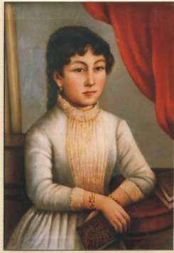 Oleo de Procesa Sarmiento